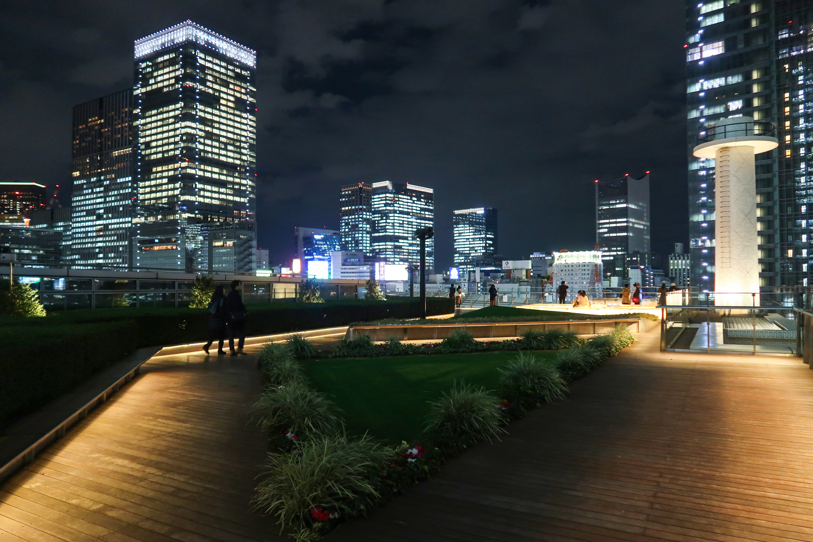 KITTE Marunouchi Rooftop garden night view